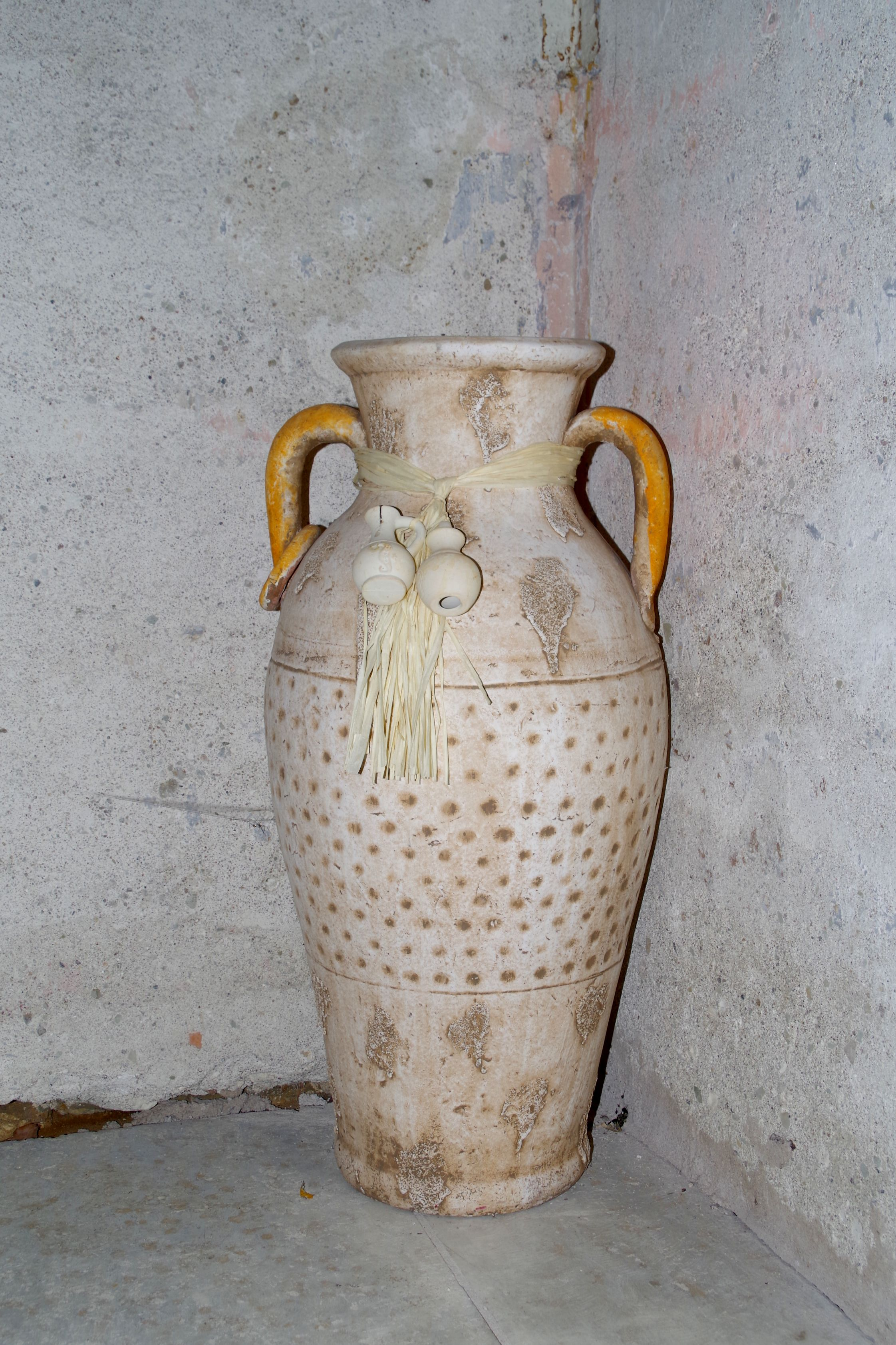 Jõelähtme kirik, 14.-20.saj.